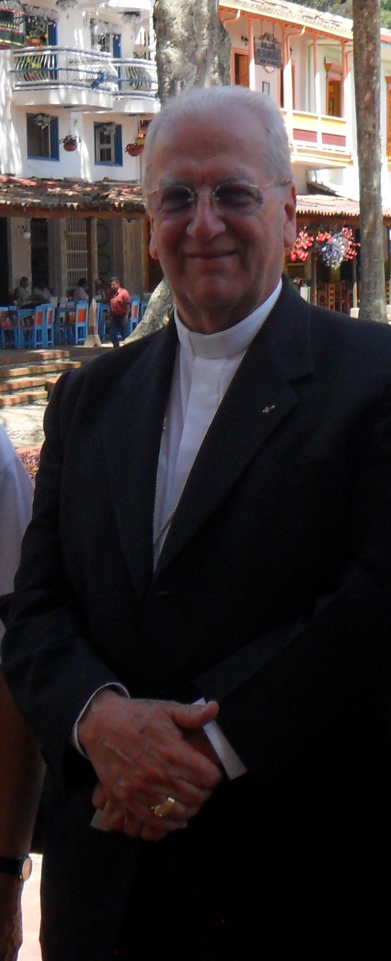 Visita de Mons. Tulio Duque Gutiérrez, SDS a Jericó, Ant.